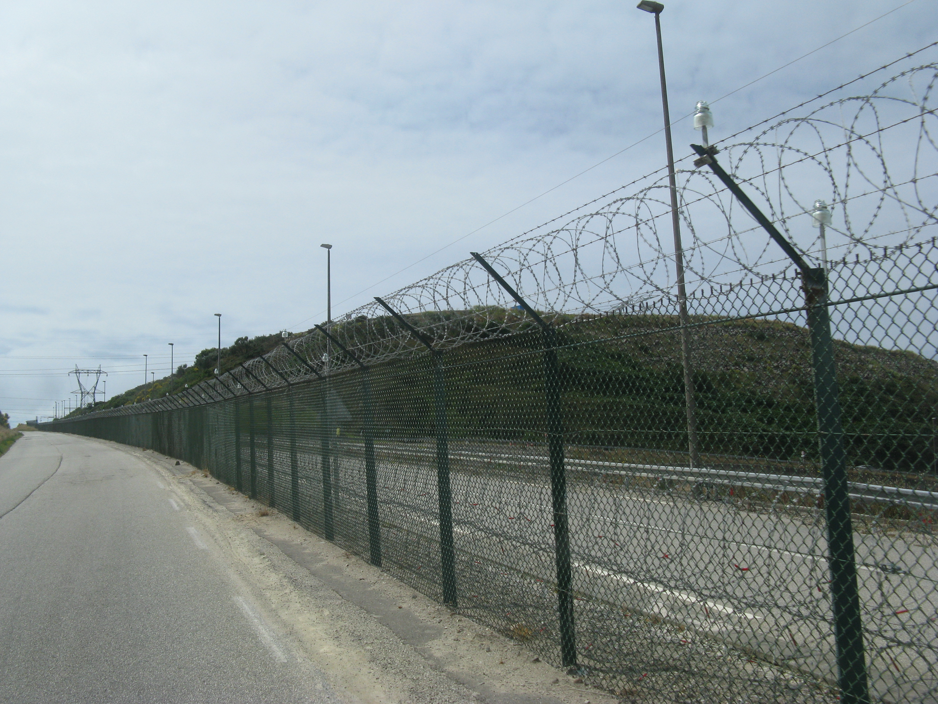 Kernkraftwerk Flamanville, Frankreich